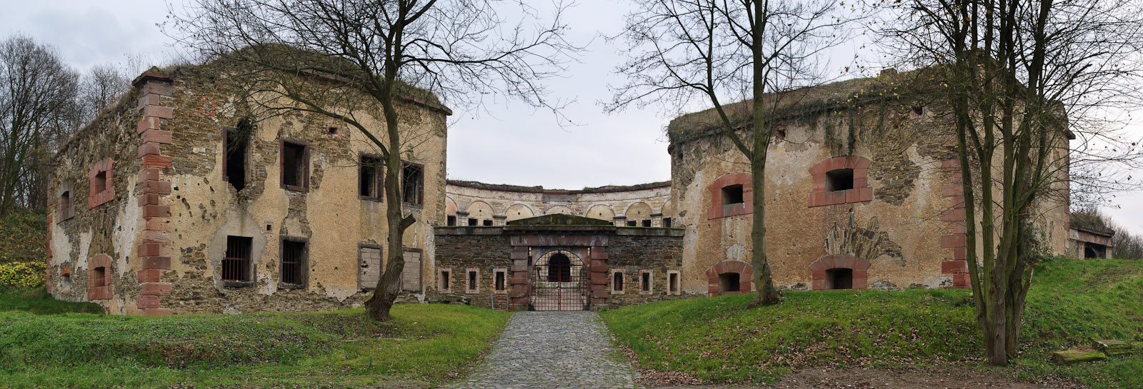 Fort Asterstein, Teil der ehemaligen "Festung Koblenz" in der Stadt Koblenz, Stadtteil Asterstein, Rheinland-Pfalz, Deutschland